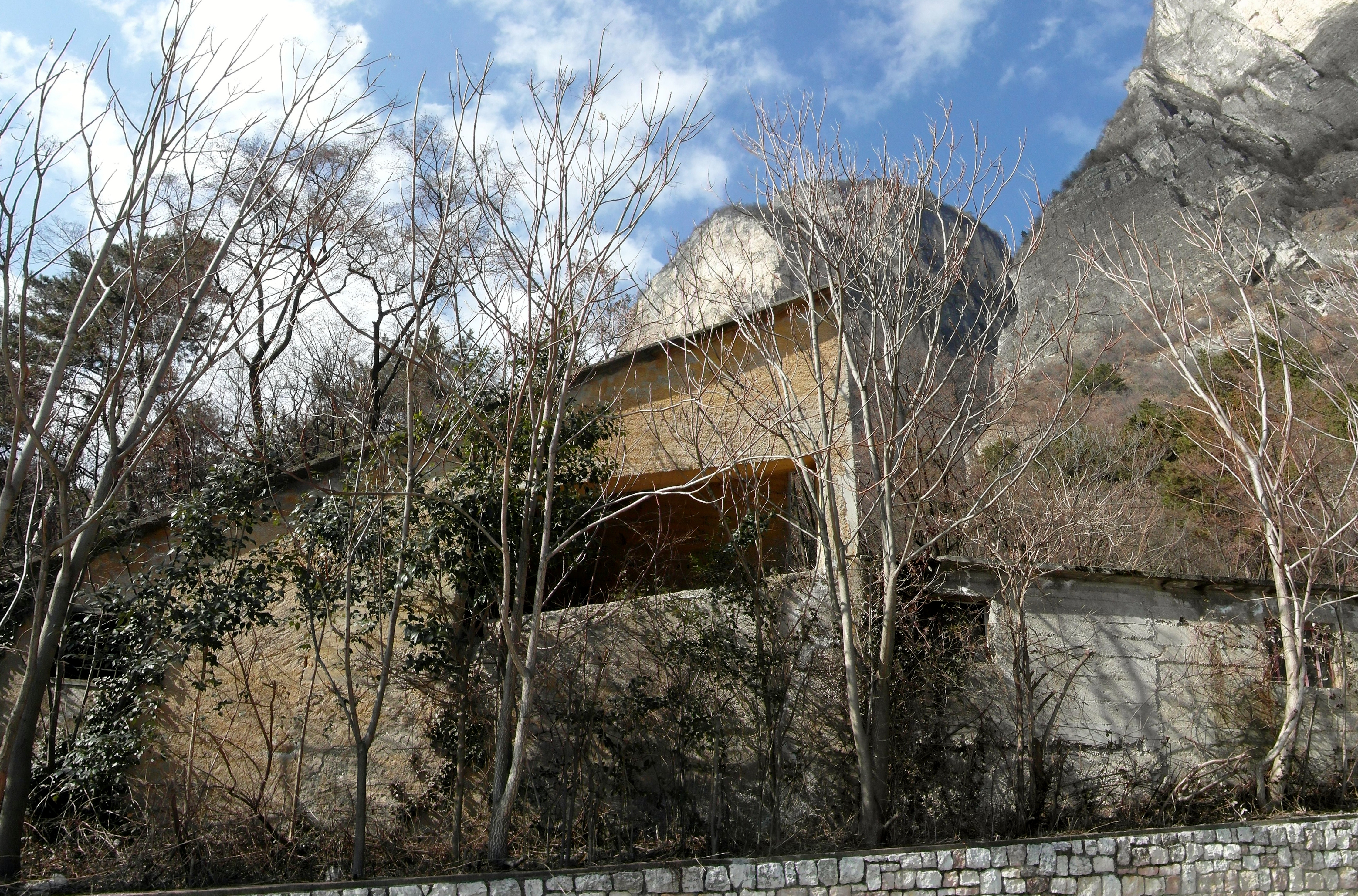 Antica stazione di partenza della Funivia Mezzocorona-Monte